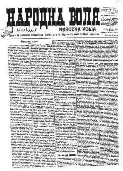 Главата на вестник Народна воля.